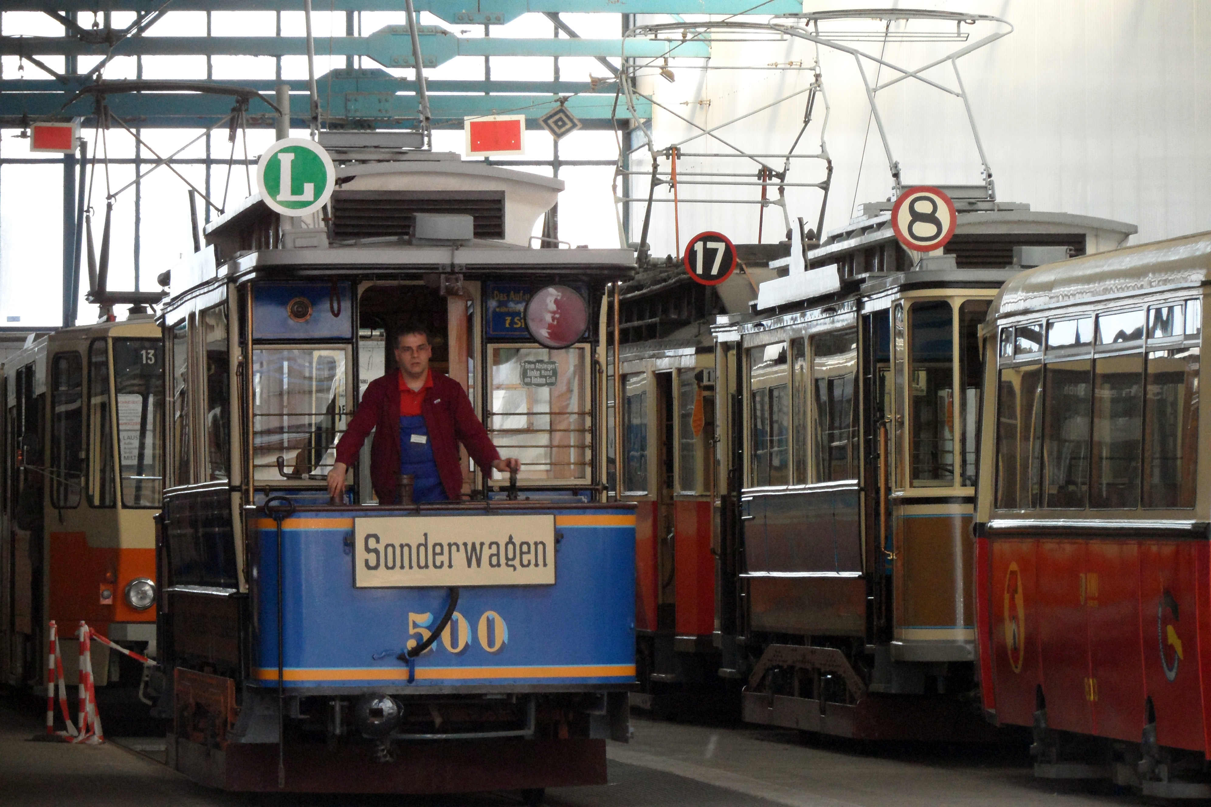 Triebwagen des Typs 13, Baujahr 1907. Zwar laufen auch diese Wagen noch auf den zur Bauzeit schon zehn Jahre alten Union-Laufgestellen, doch hat man den Achsstand von 1800 auf 2300 Millimeter vergrößert. Elektrisch entsprechen die Wagen mit nur einem kleinen Fahrmotor mit nur 17kW den Typen 10 und 11/12, doch entstanden die ersten Wagen auch schon 1899.Der Wagen 500 war von 1933 bis 1966 mit der Arbeitswagennummer 5154 Schneepflugtriebwagen, nur dadurch ist er noch heute erhalten.Beim Wegsetzen der Fahrzeuge kurz vor der Schließung des Museums. Langsam wird es im Schuppen eng.